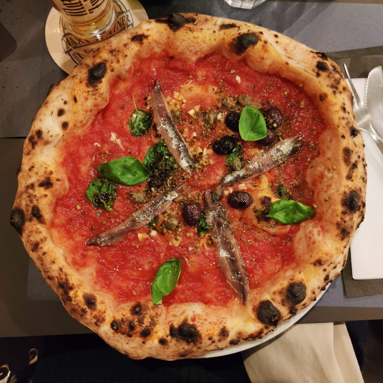 Pizza napoletana con alici e olive di gaeta